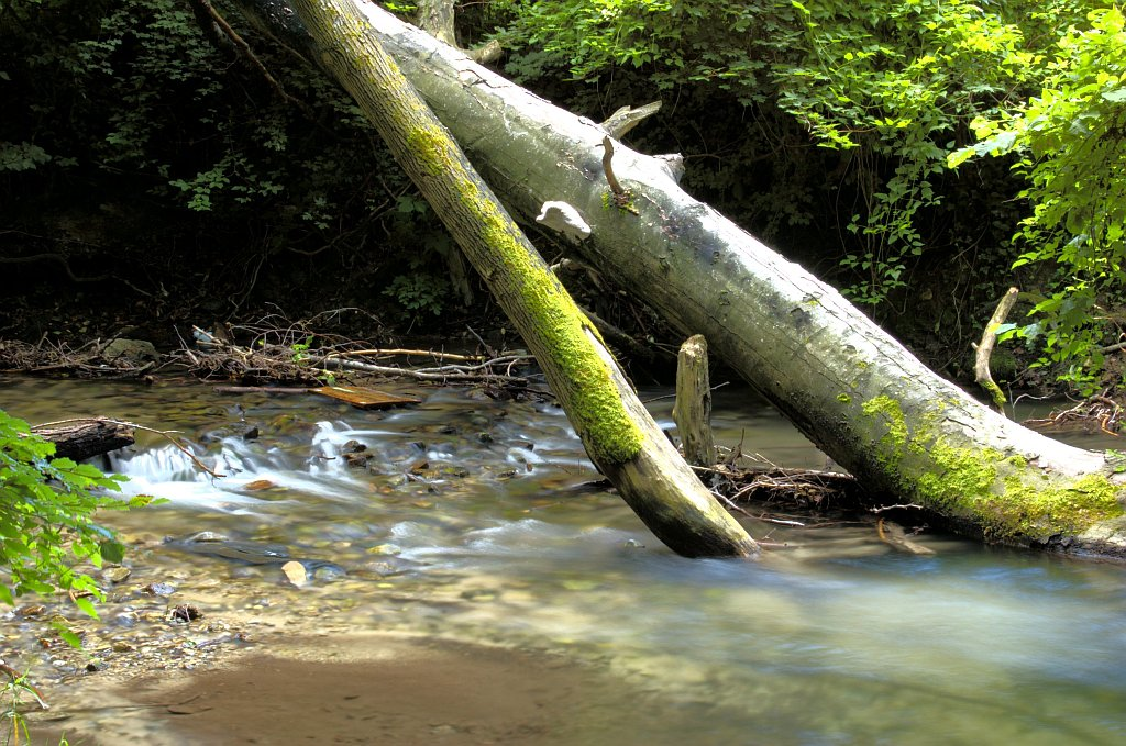 Stupavský potok